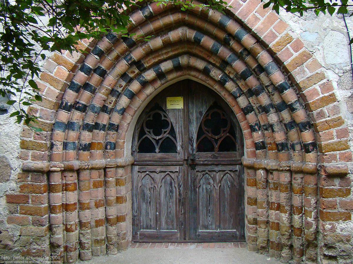 Dorfkirche Groß Gievitz, Südportal